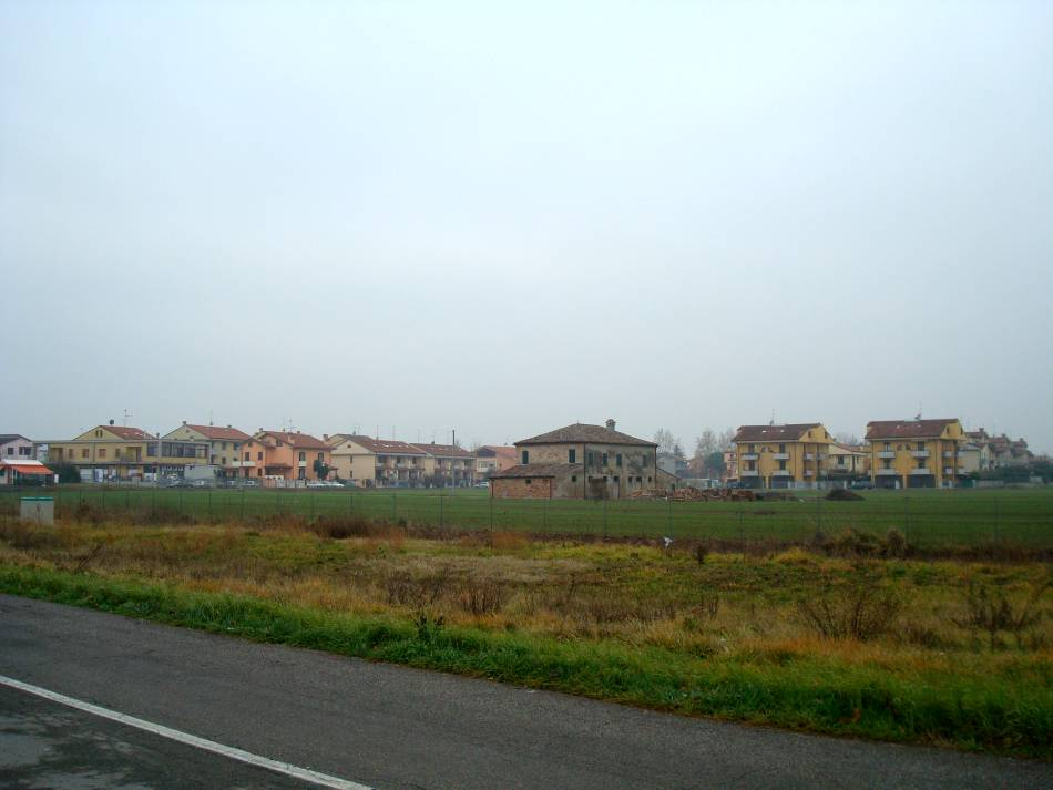 Zona Pepp di Macerone di Cesena. Foto personnale di Neri.JP (Il 04/01/2008)